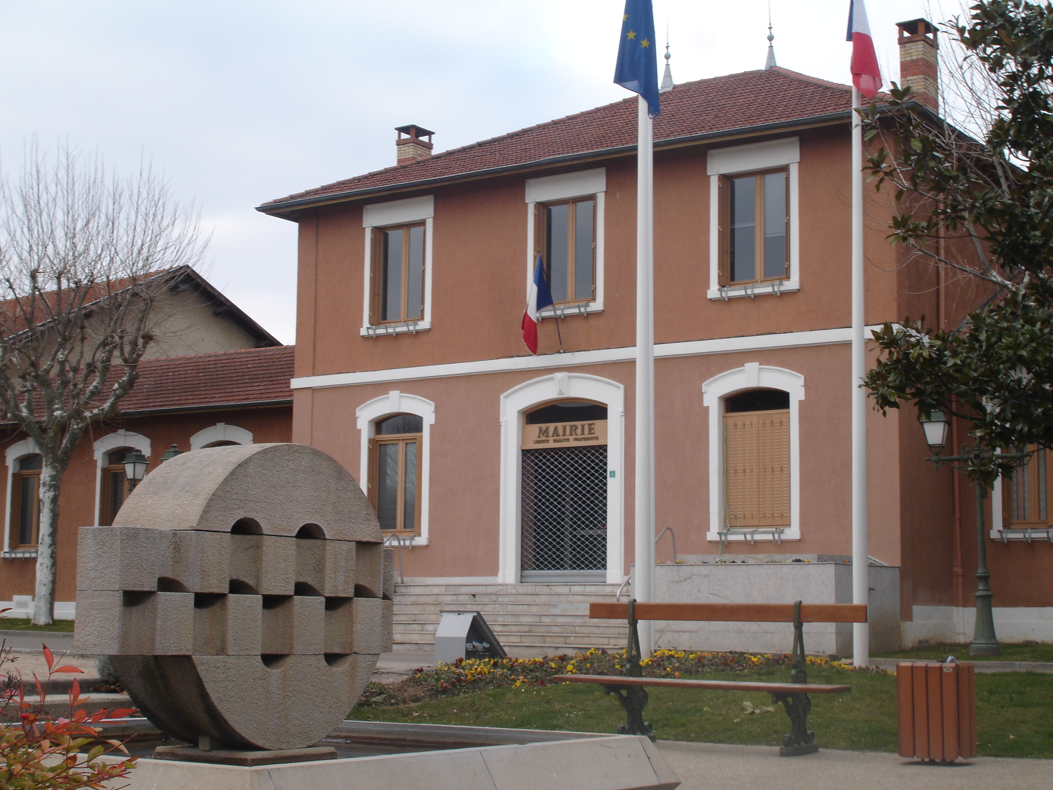 Chaponnay (69) : la mairie